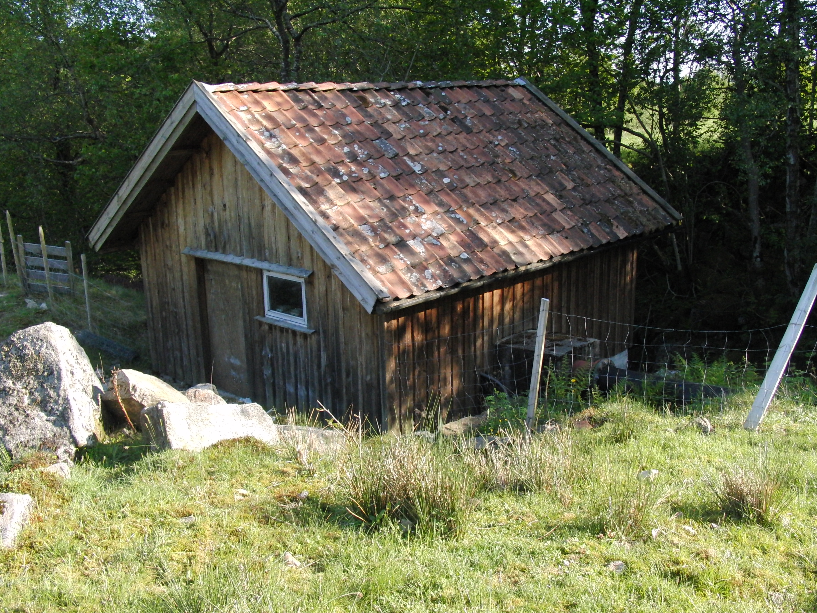 Bjelland I kraftverk